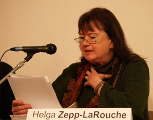 Helga Zepp-LaRouche, Vorsitzende der Partei BüSo, auf einer Konferenz in Paris